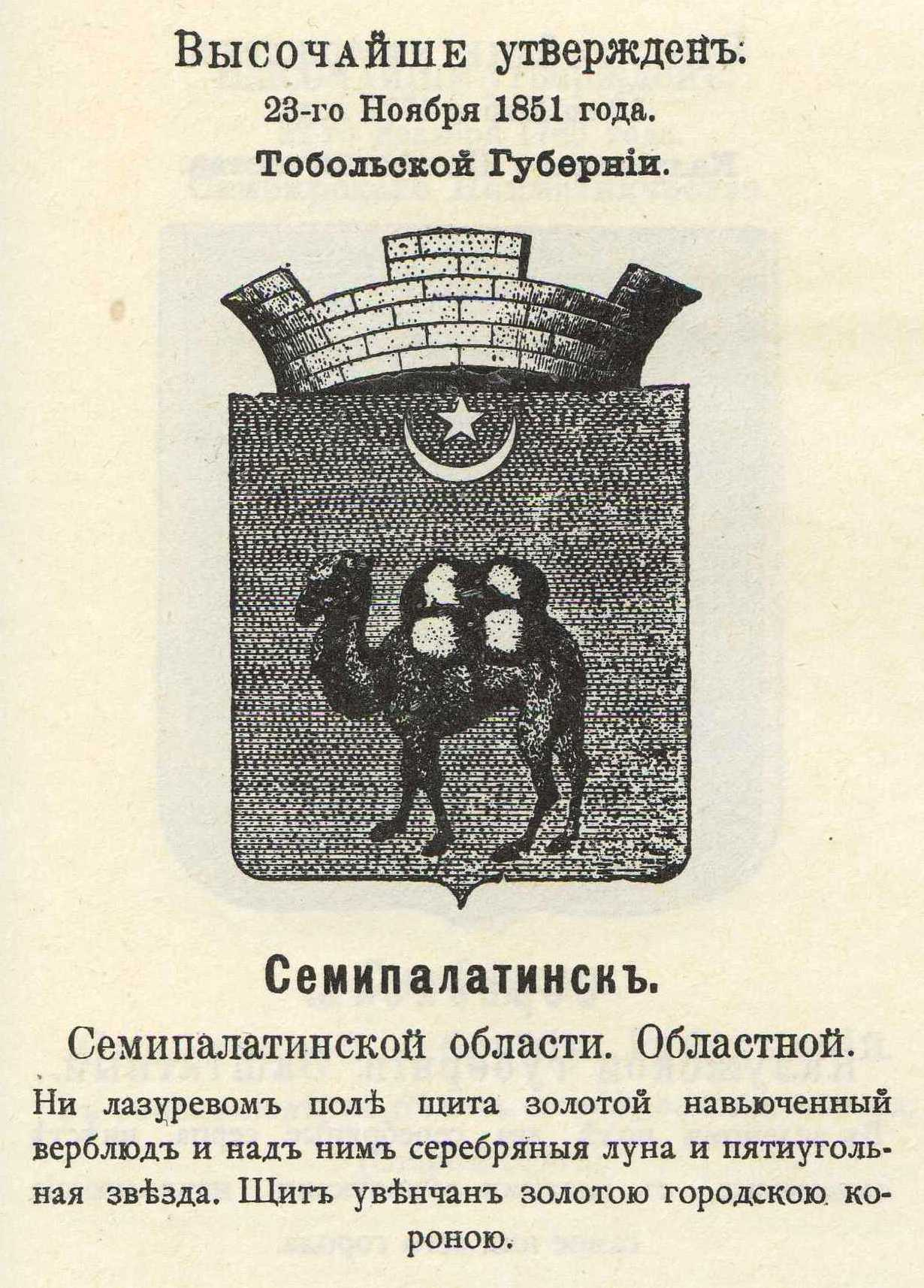 Official Russian Empire coat of arm Semipalatinsk. Герб Российской Империи областного города Семипалатинск Семипалатинской области (до образования области - Тобольской губернии) с официальным описанием в Гербовнике Винклера.